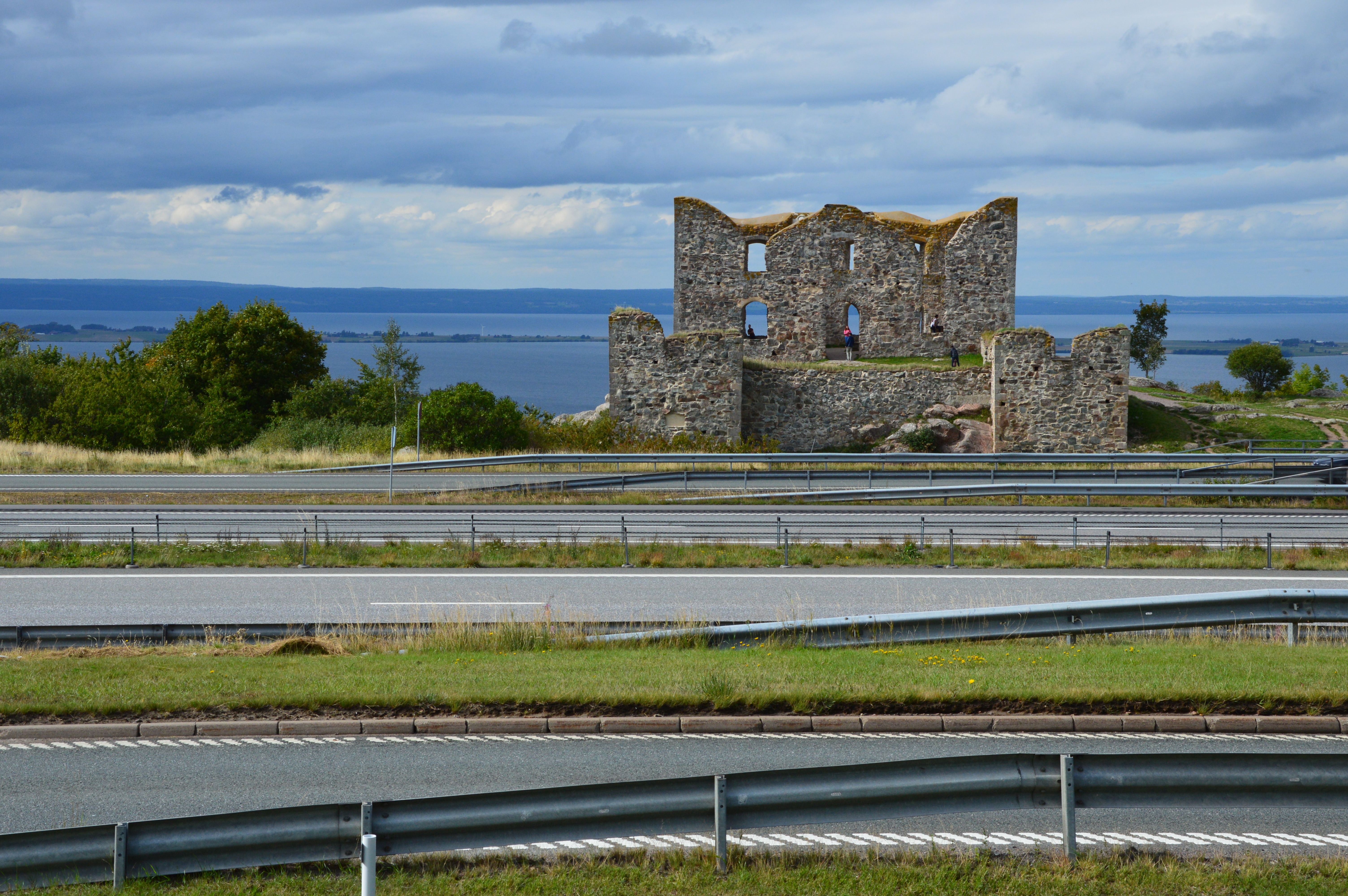 Brahehus Rootsis. Vaade üle E4 maantee. Taustal on Vätterni järv.